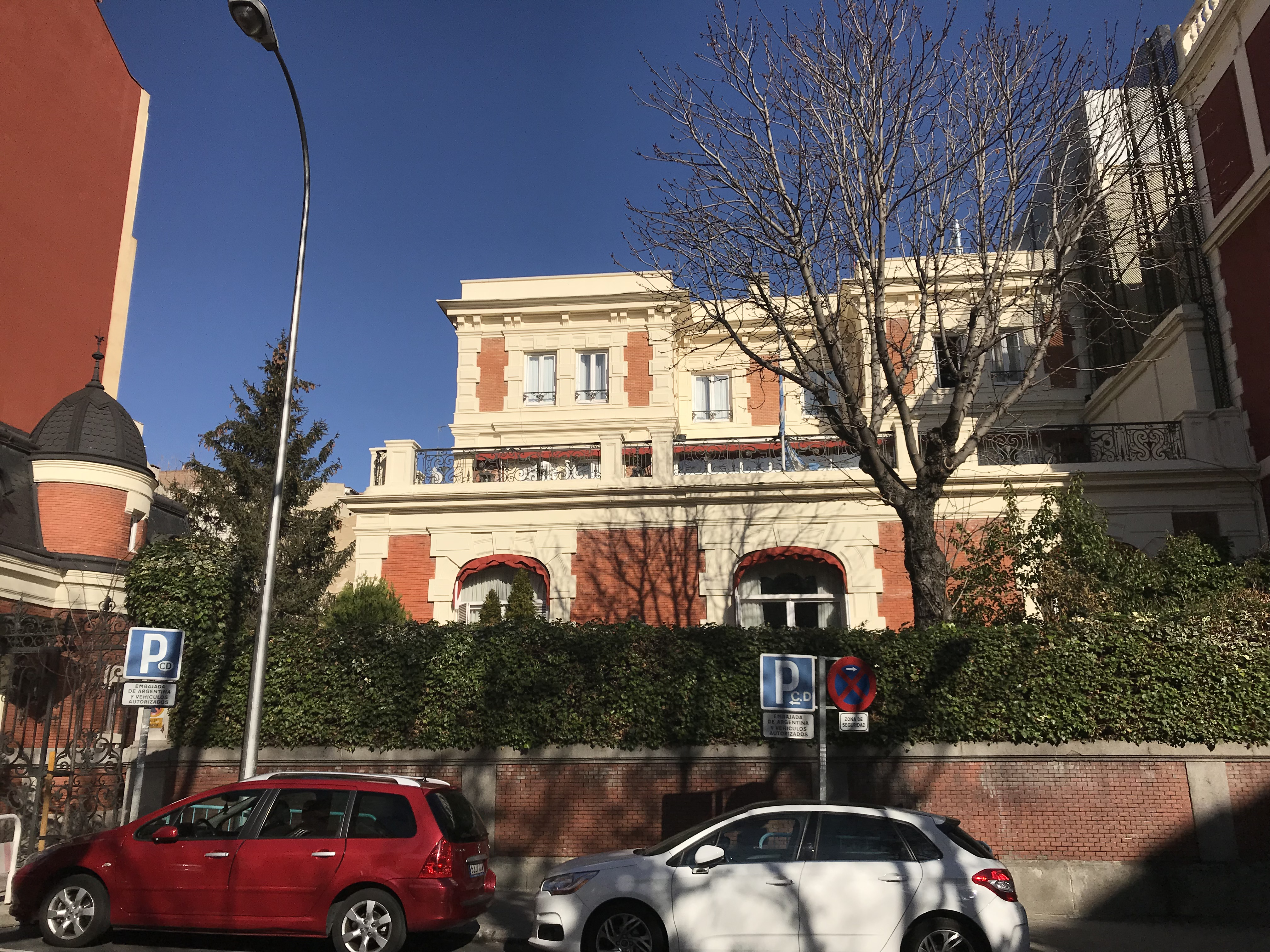 Argentinian embassy, Madrid COAM L2.65